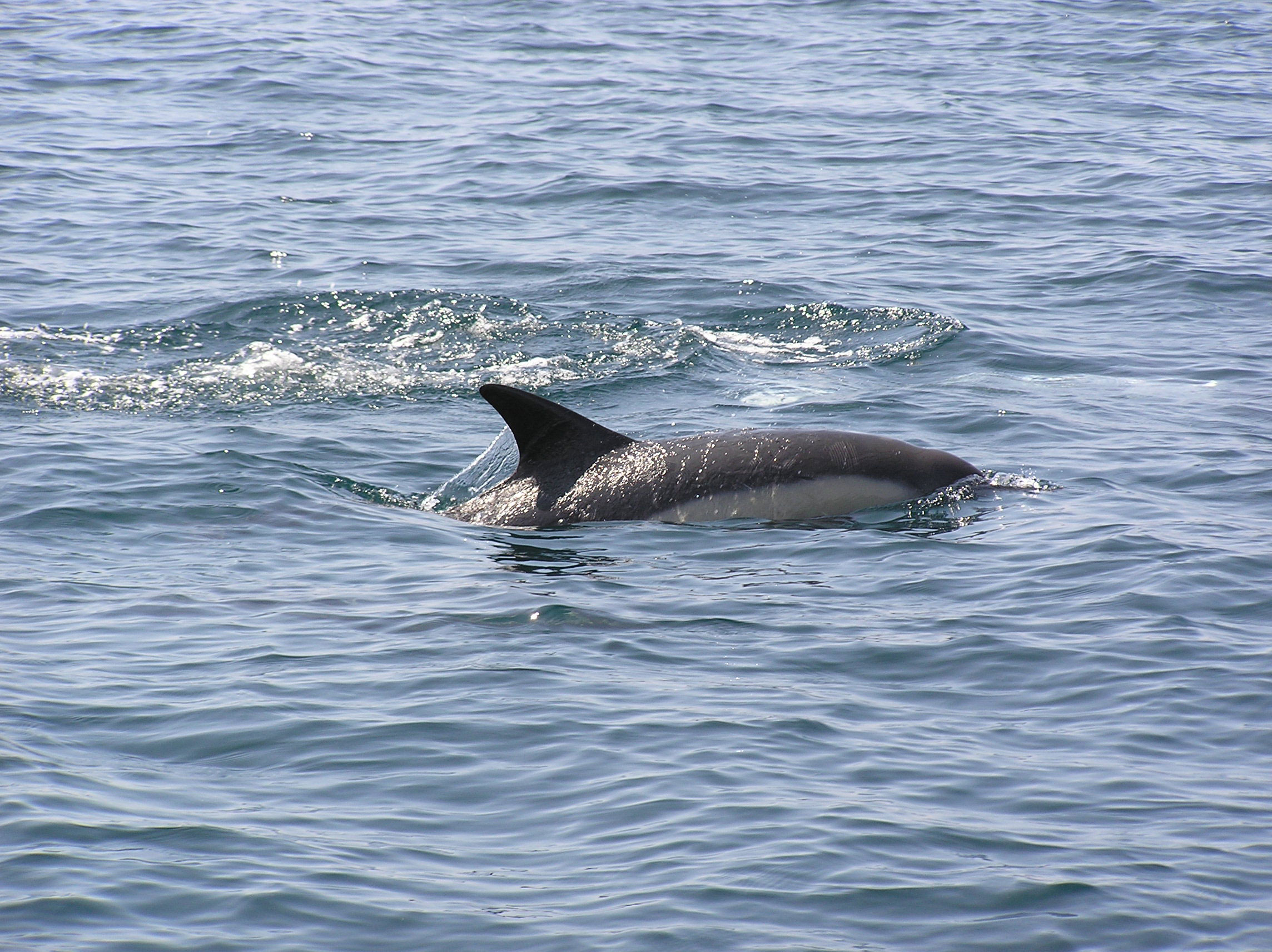 Description : Dos de dauphin en Bretagne Sud On voit clairement l'évent ainsi qu'une marque laissée par un filet? Lieu : Bretagne Sud, France Auteur : Pline Photo Personnelle